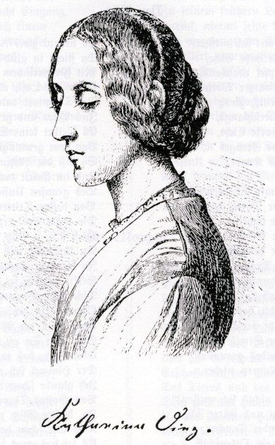 Portrait der deutschen Schriftstellerin Katharina Diez.